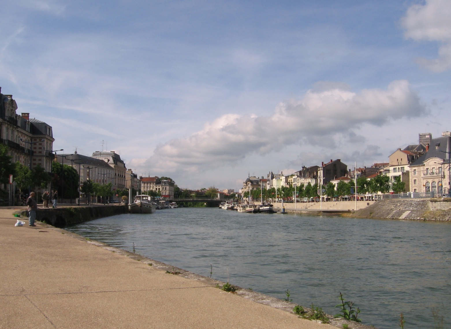 Verdun